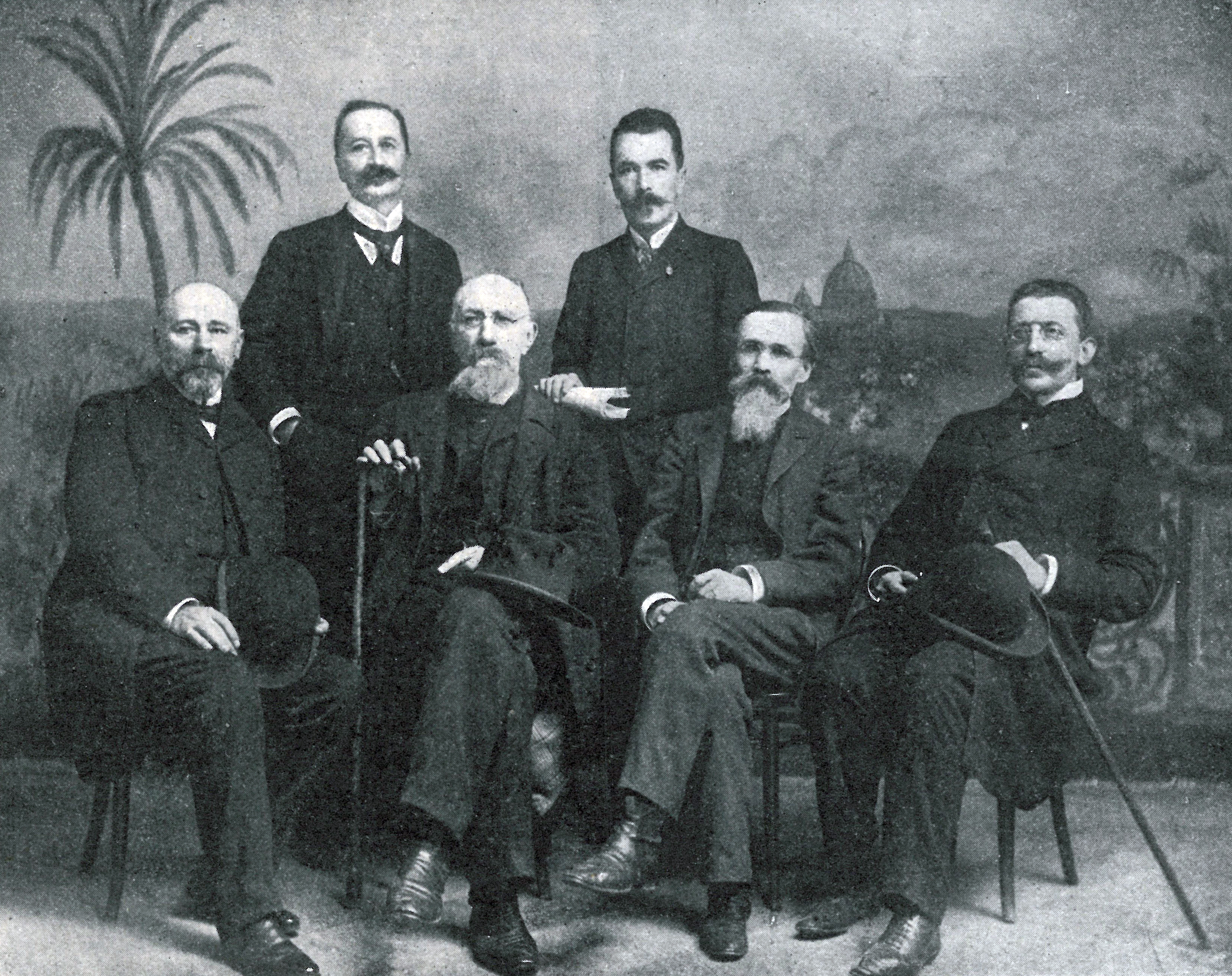 Polacy uczestnicy Kongresu Historycznego w Rzymie (kwiecień 1903). Stoją od lewej: Adam Darowski, Władysław Jabłonowski; siedzą od lewej: Aleksander Kraushar, Aleksander Jabłonowski, Tadeusz Korzon, Bronisław Dembiński.